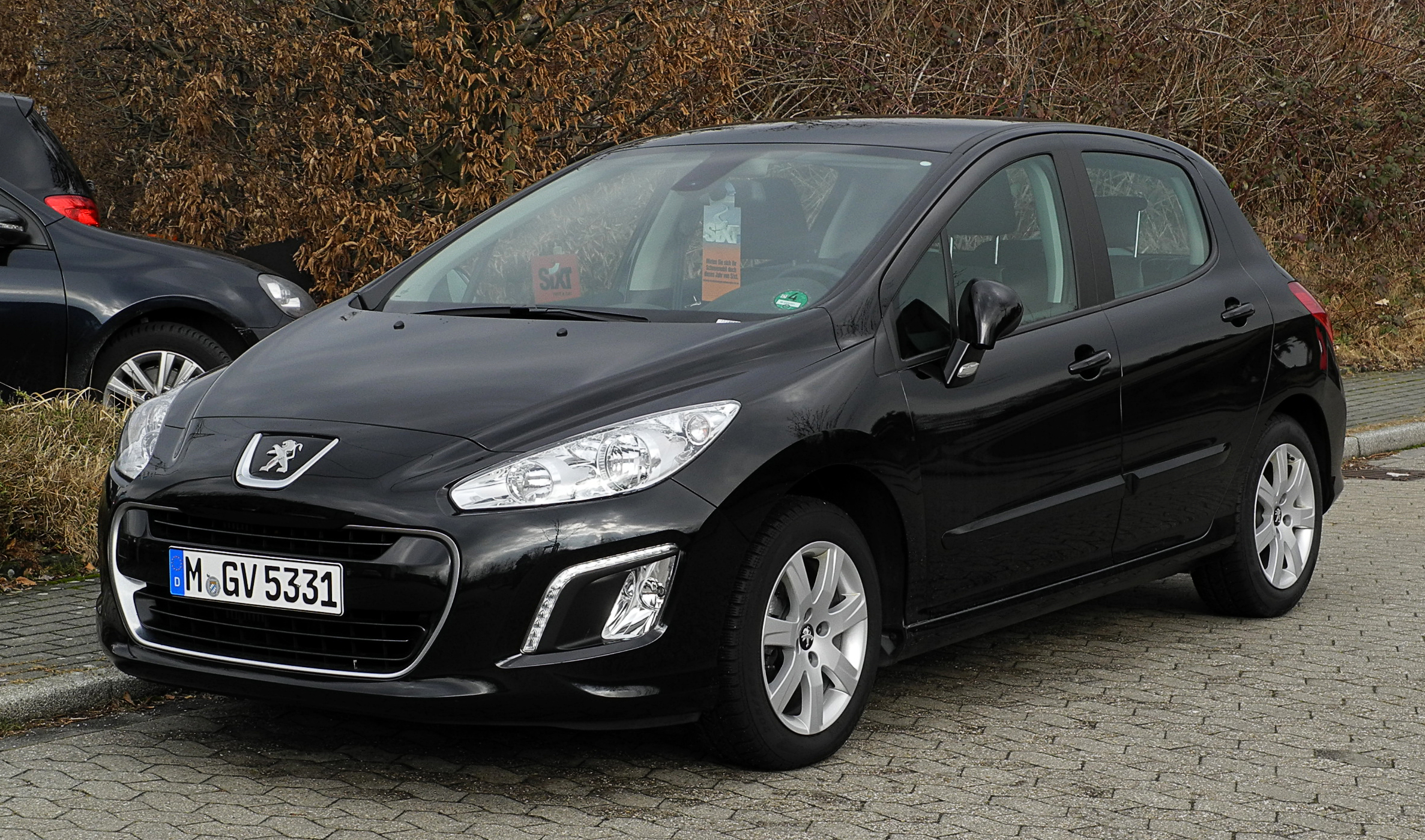 Peugeot 308 e-HDi FAP 110 STOP & START Allure (Facelift)